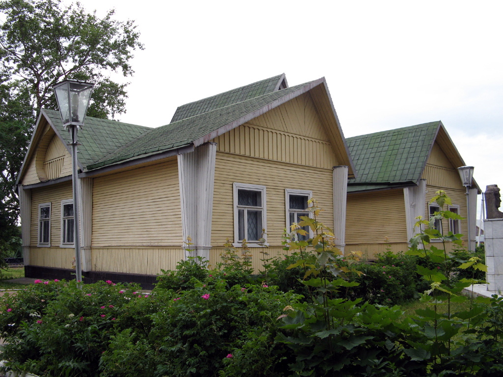 Краеведческий музей, Museum of local lore